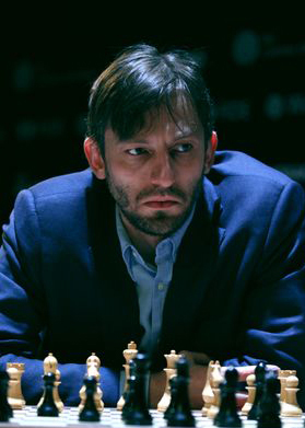 Александр Грищук, Турнир Претендентов 2018